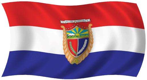 Bandera del Cantón Guaranda.